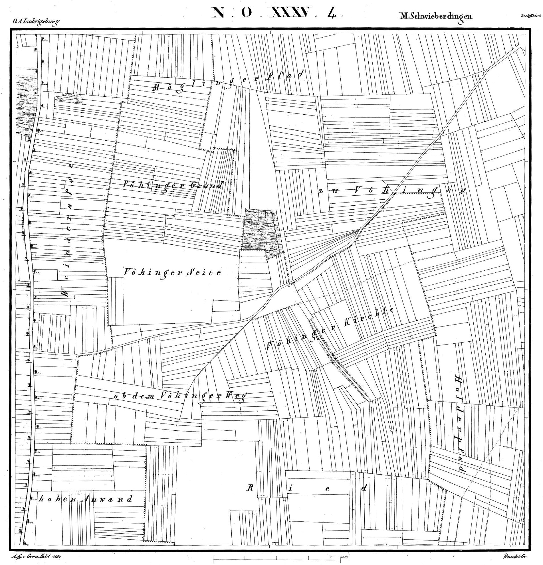 Wüstung Vöhingen auf der Urflurkarte von 1831